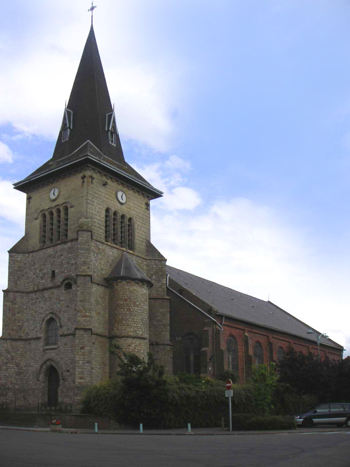 Façade de l'église de Marquion (Pas-de-Calais). Photo prise par Padawane